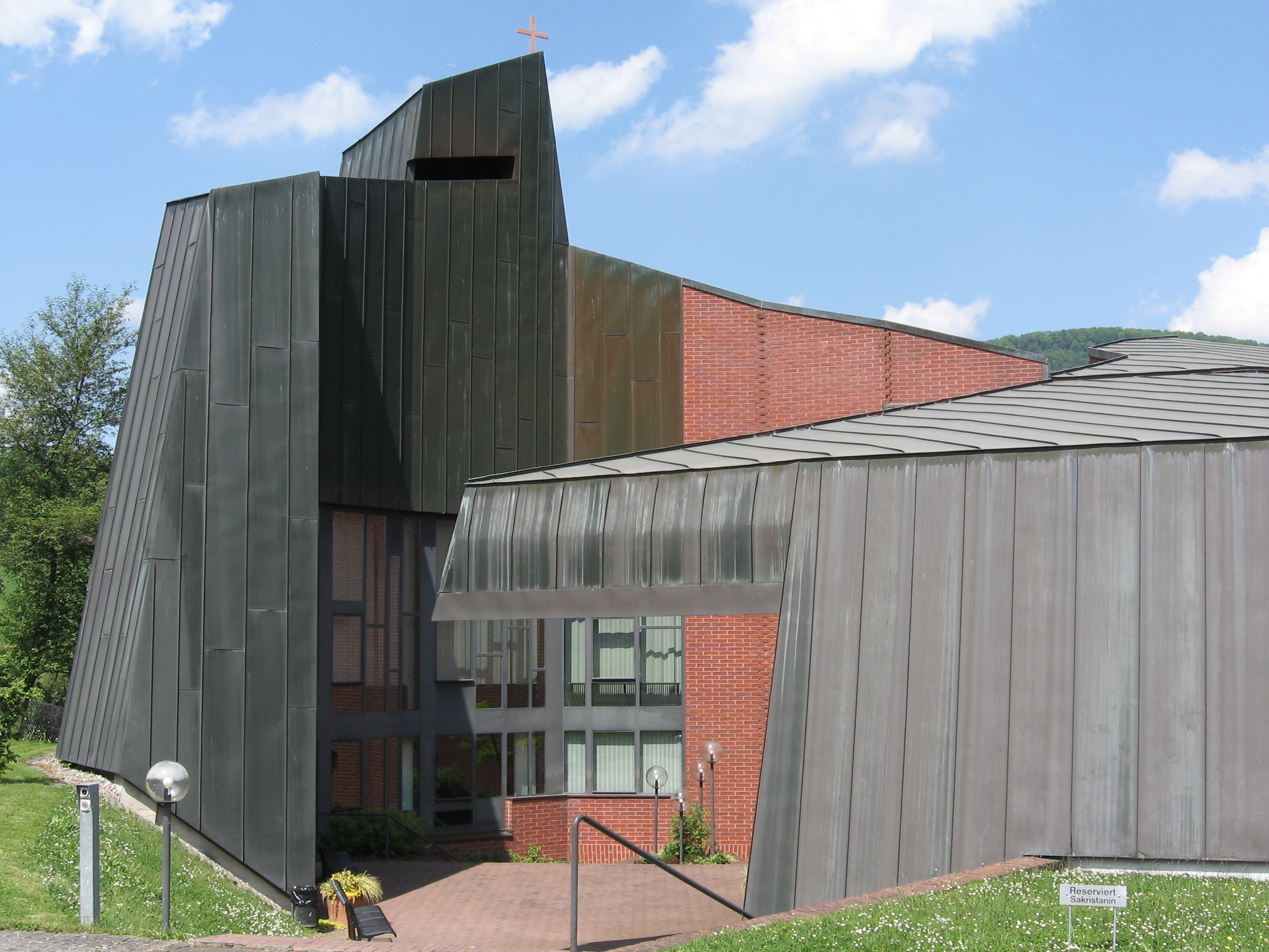 Church St. Antonius in Wildegg (Architect: Justus Dahinden, 1970)